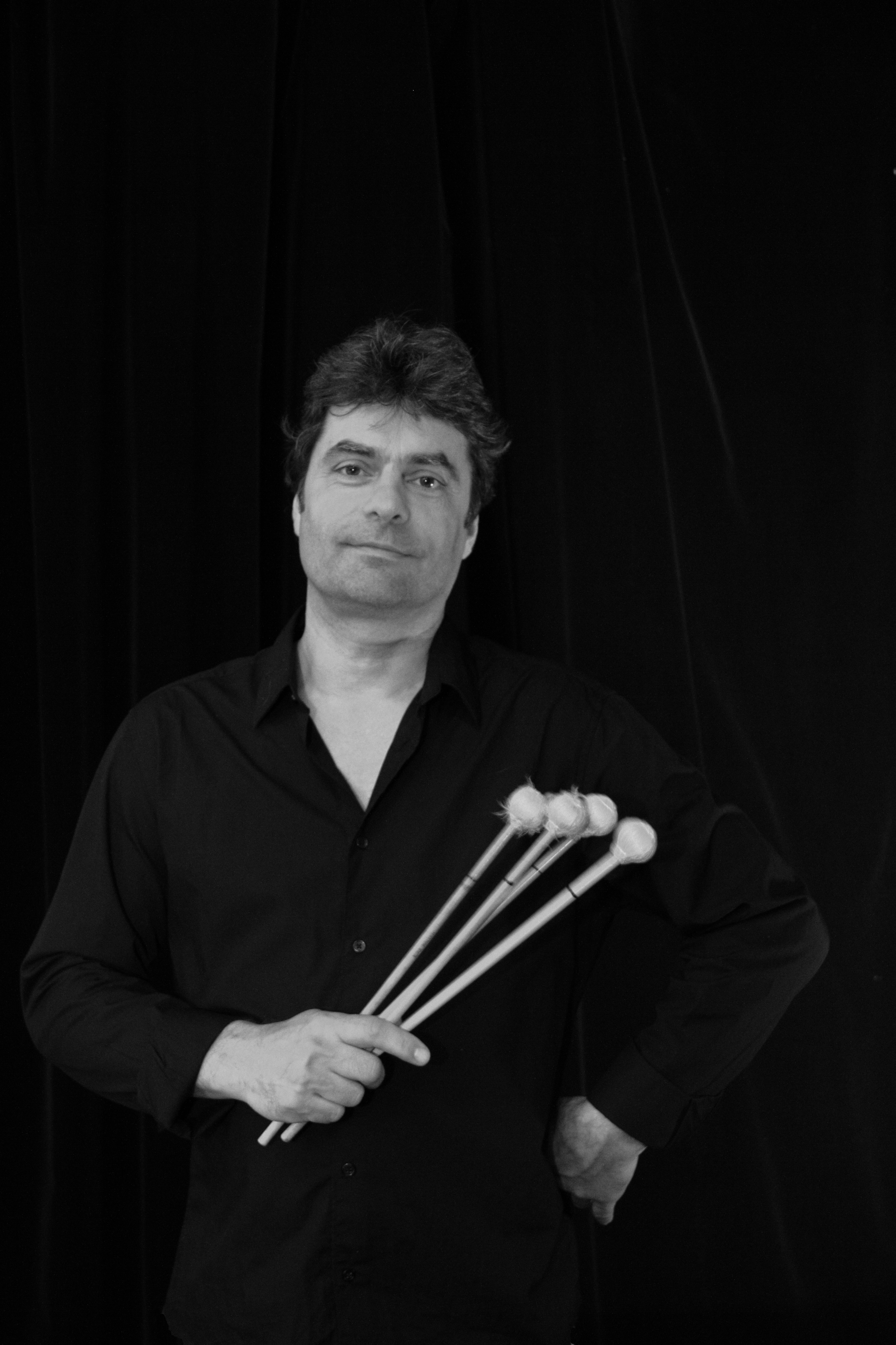 Le percussionniste Olaf Tzschoppe, membre des Percussions de Strasbourg.